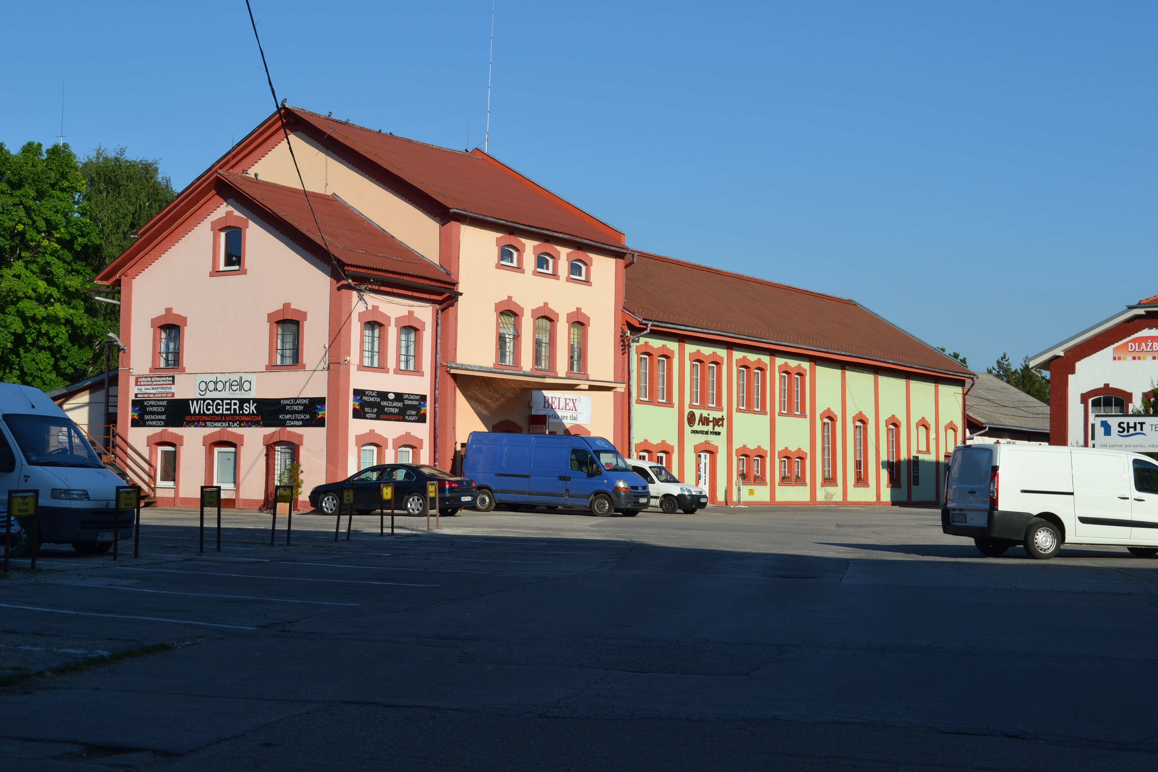 Budova, ul. Mostná 13